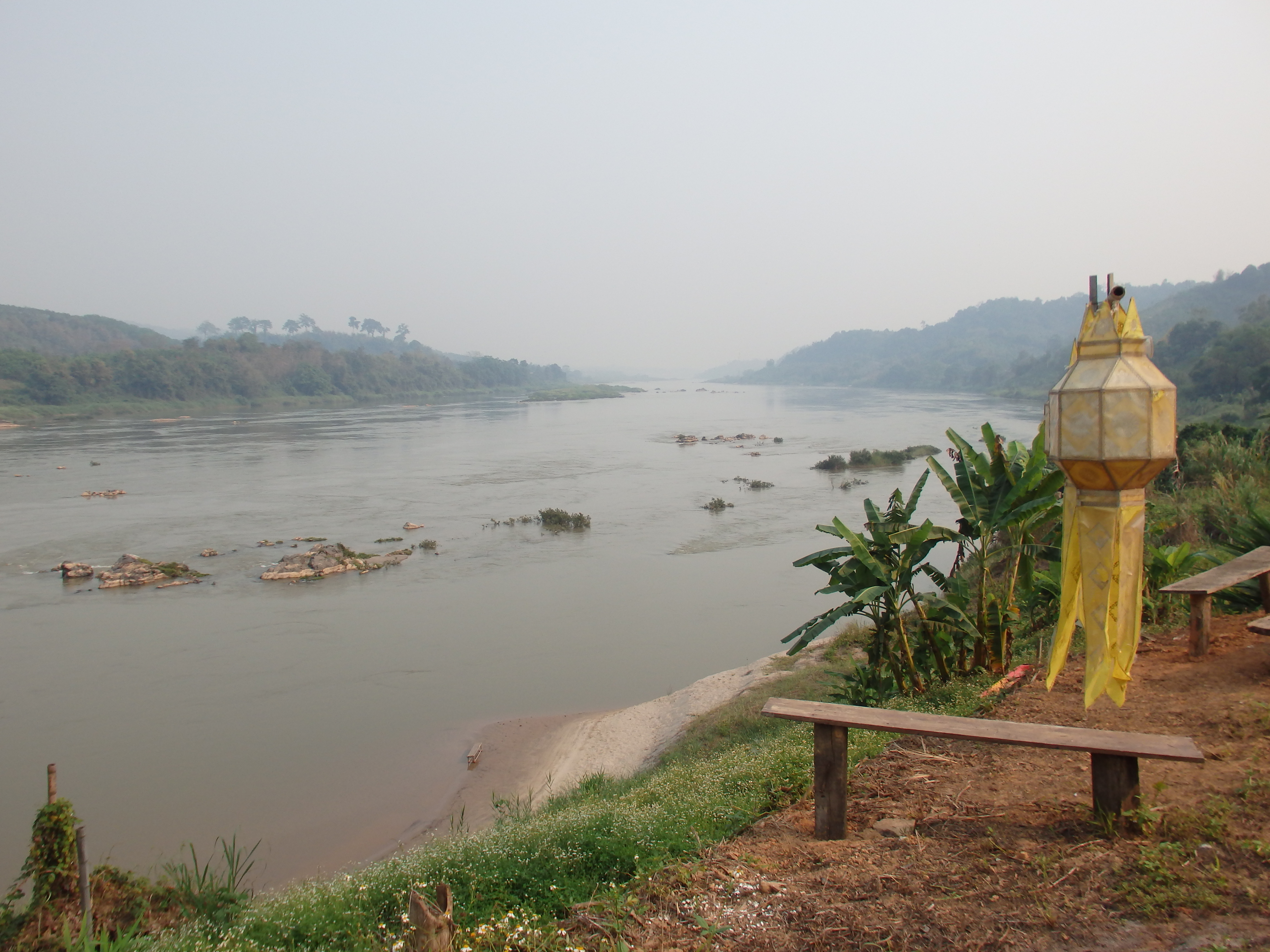 Wiang, Chiang Khong District, Chiang Rai 57140, Thailand